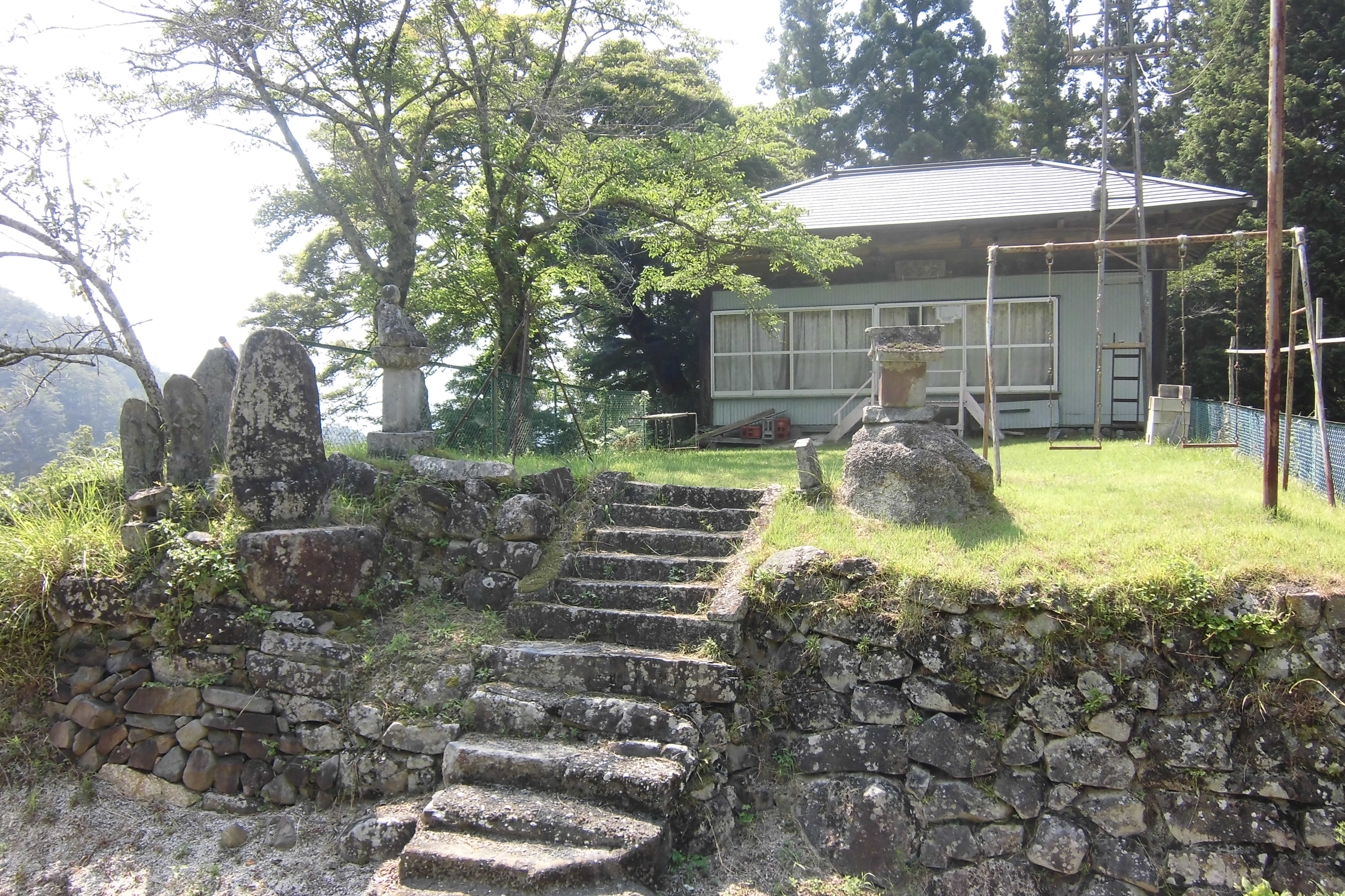 甲府市竹日向町公会堂（常雲寺跡）